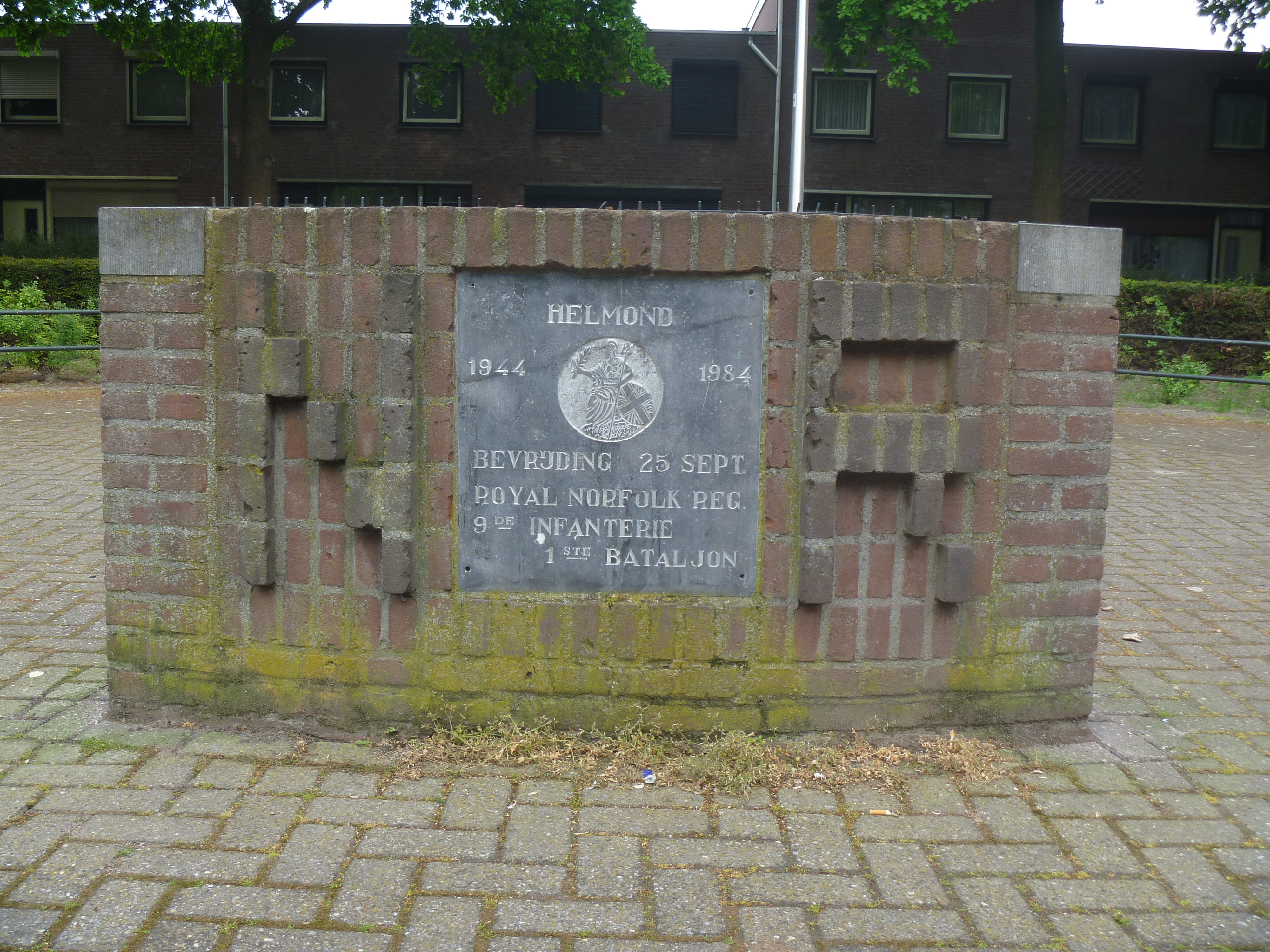 Helmond 1944 - 1984 Bevrijding 25 sept Royal Norfolk Reg. 9de Infanterie 1ste Bataljon